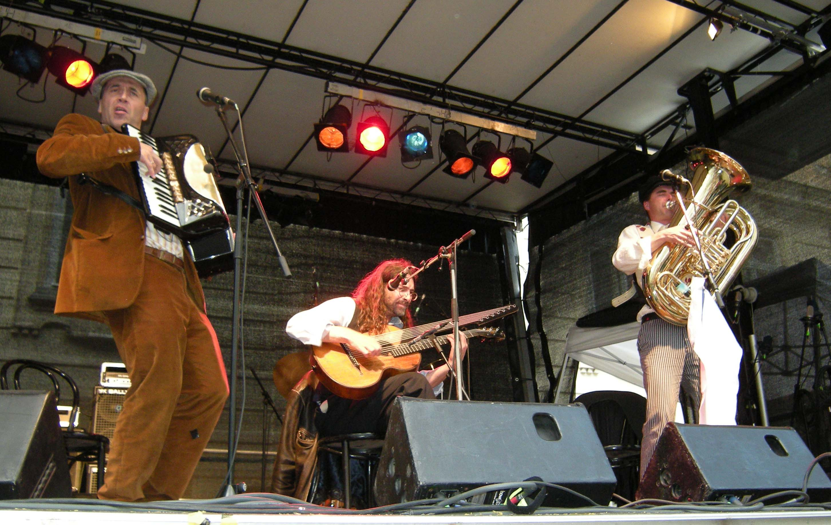 Kollegium Kalksburg Trio performing at Vienna's 25th annual "Stadtfest", 2008 (from left: Heinz Ditsch, Paul Skrepek, Wolfgang Vincenz Wizlsperger).